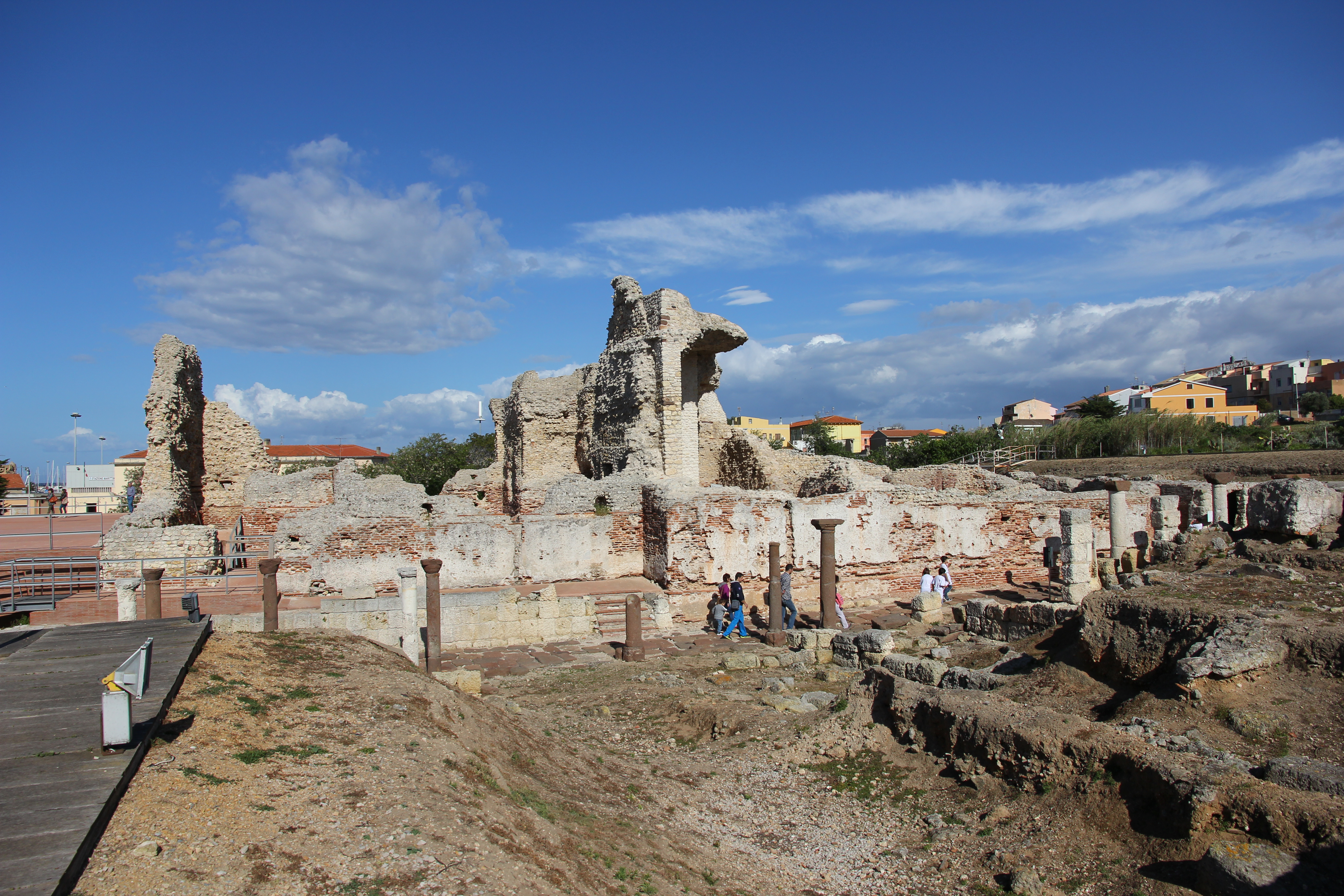 Porto Torres - Terme romane del palazzo di re Barbaro